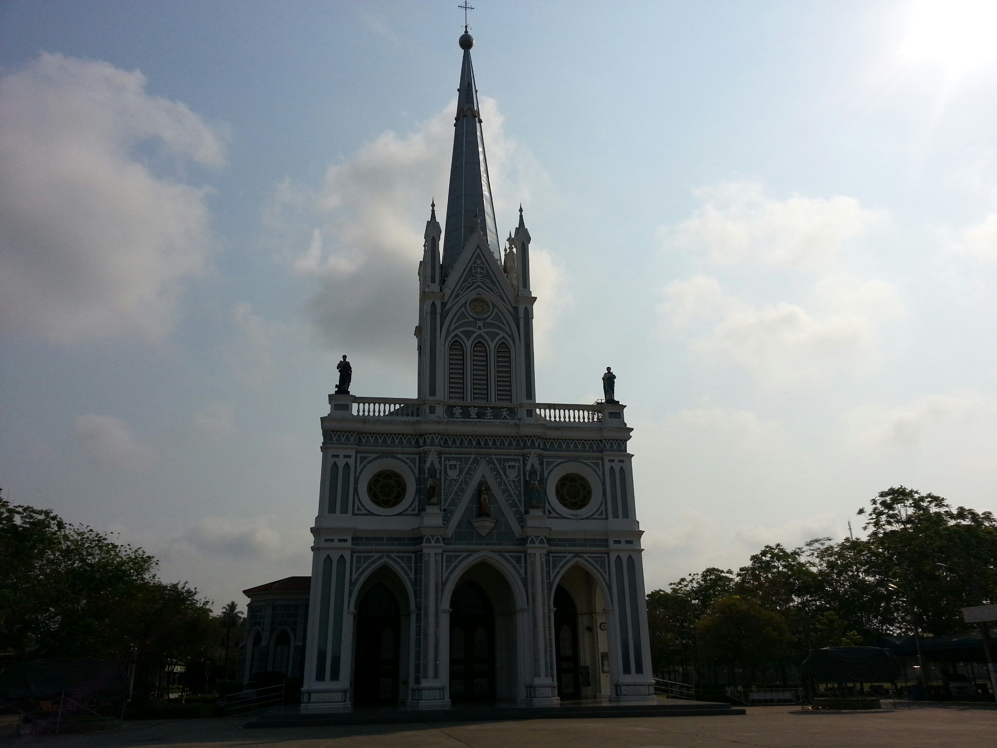 Bang Nok Kwaek, Bang Khonthi District, Samut Songkhram, Thailand